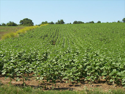 Çavuşlu'da bir ayçiçeği tarlası Çavuşlu, Uzunköprü, Edirne